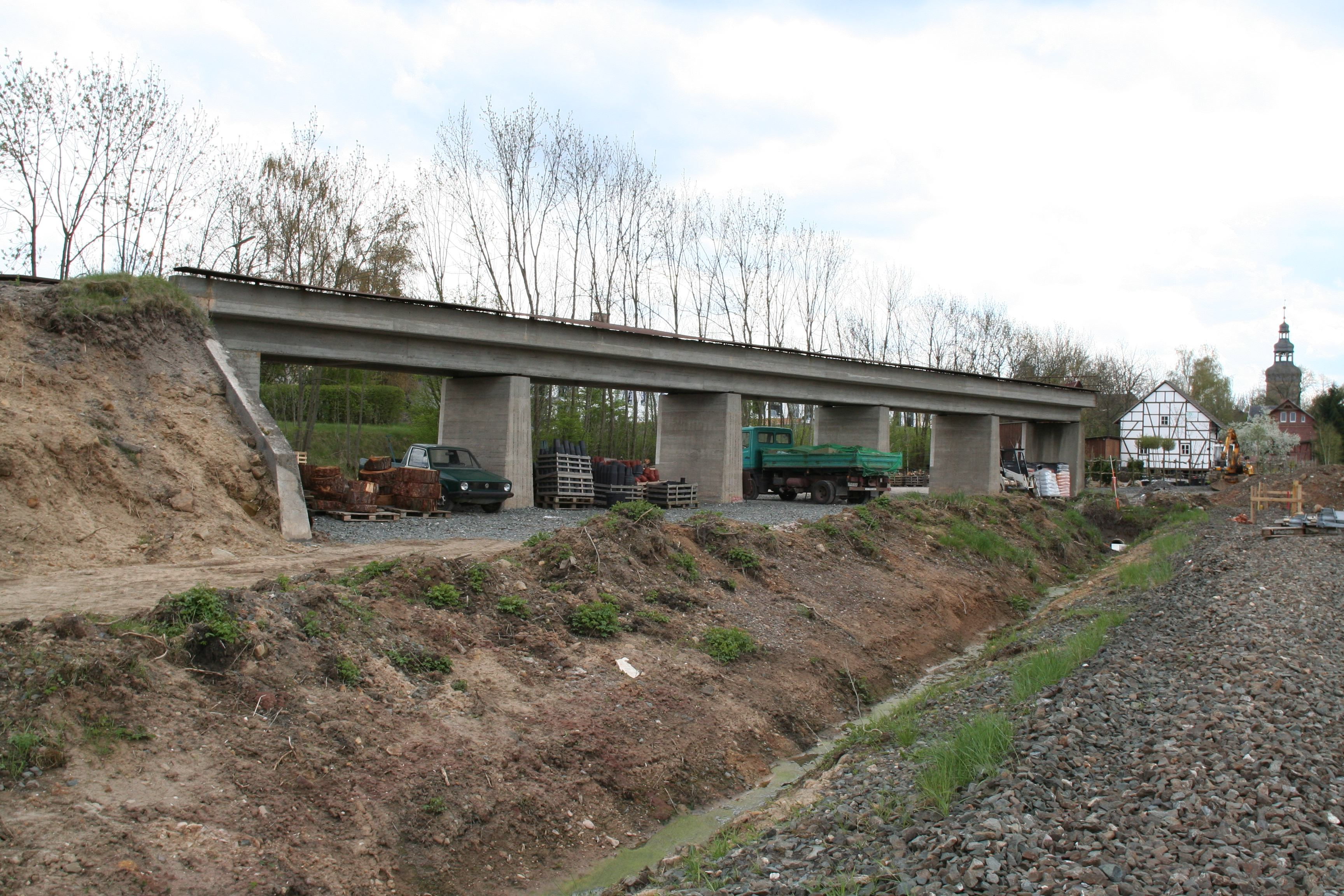 Alte Laderampe in Großheirath, Landkreis Coburg